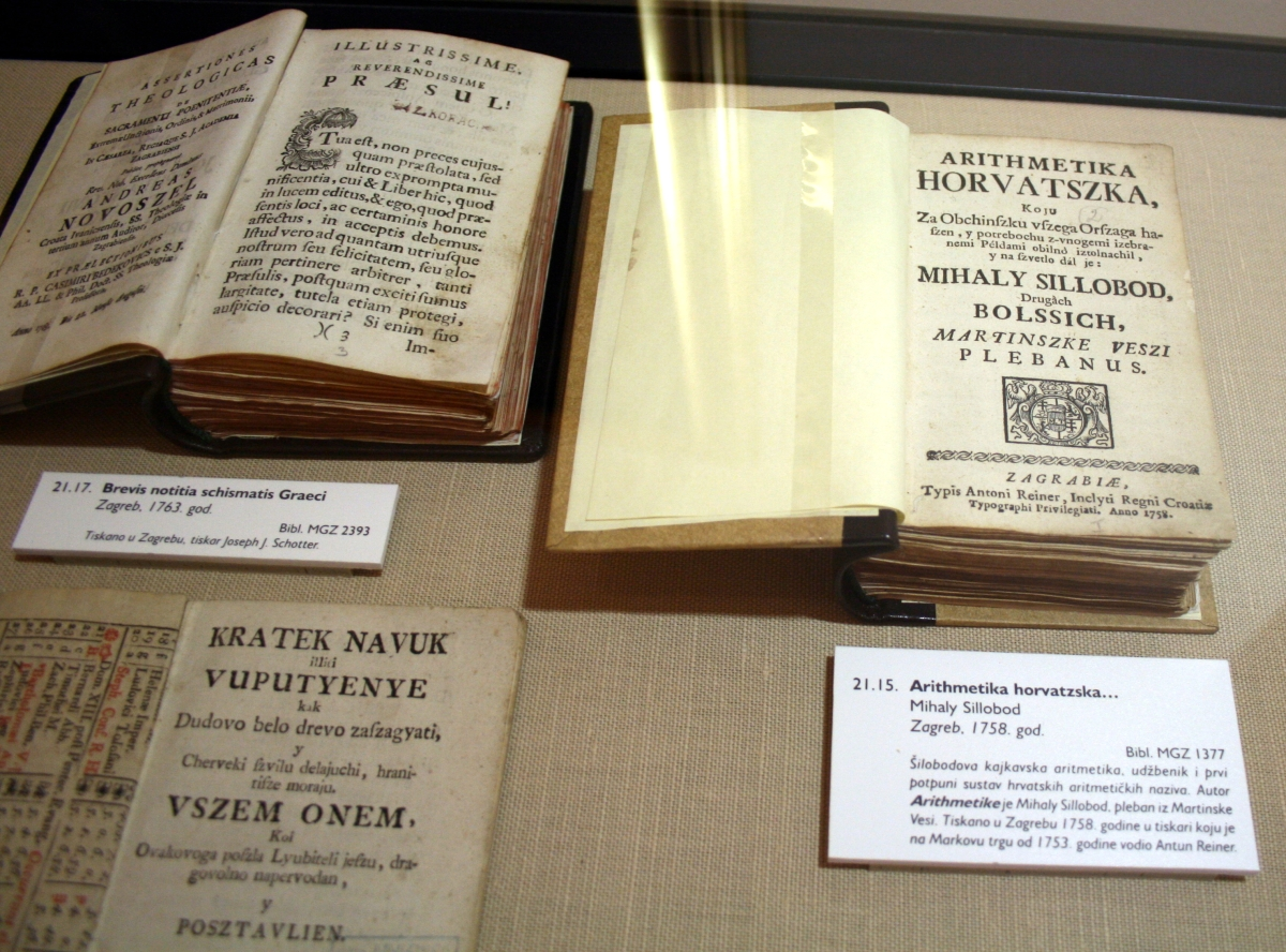 Arithmetika Horvatszka, u Muzeju grada Zagreba snimljena tijekom Noći muzeja